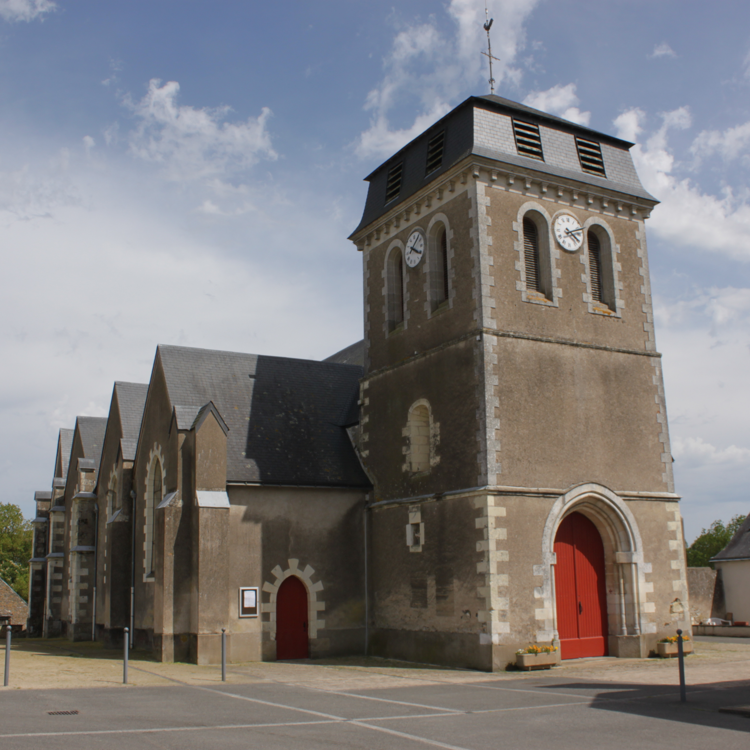 Église Saint-Martin, XV°-XVI°, Pannecé.